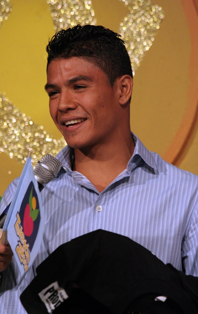 José "quiebrajicara" Alfaro, campeón Mundial de Boxeo